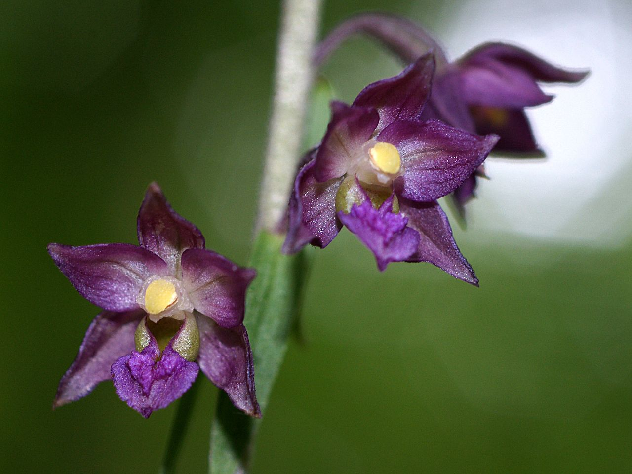 Epipactis atrorubens